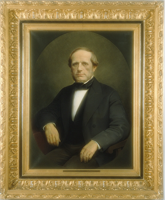 Wilhelm Kempe. Originalporträtt (efter fotografi) av J. Siegmund (år 1885), Ryssland.